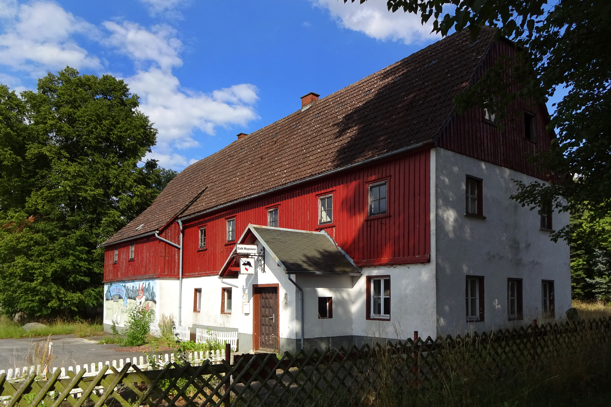 Ehemaliges Gasthaus "Dürrer Fuchs" in Schmiedeberg an der Bundesstraße 6